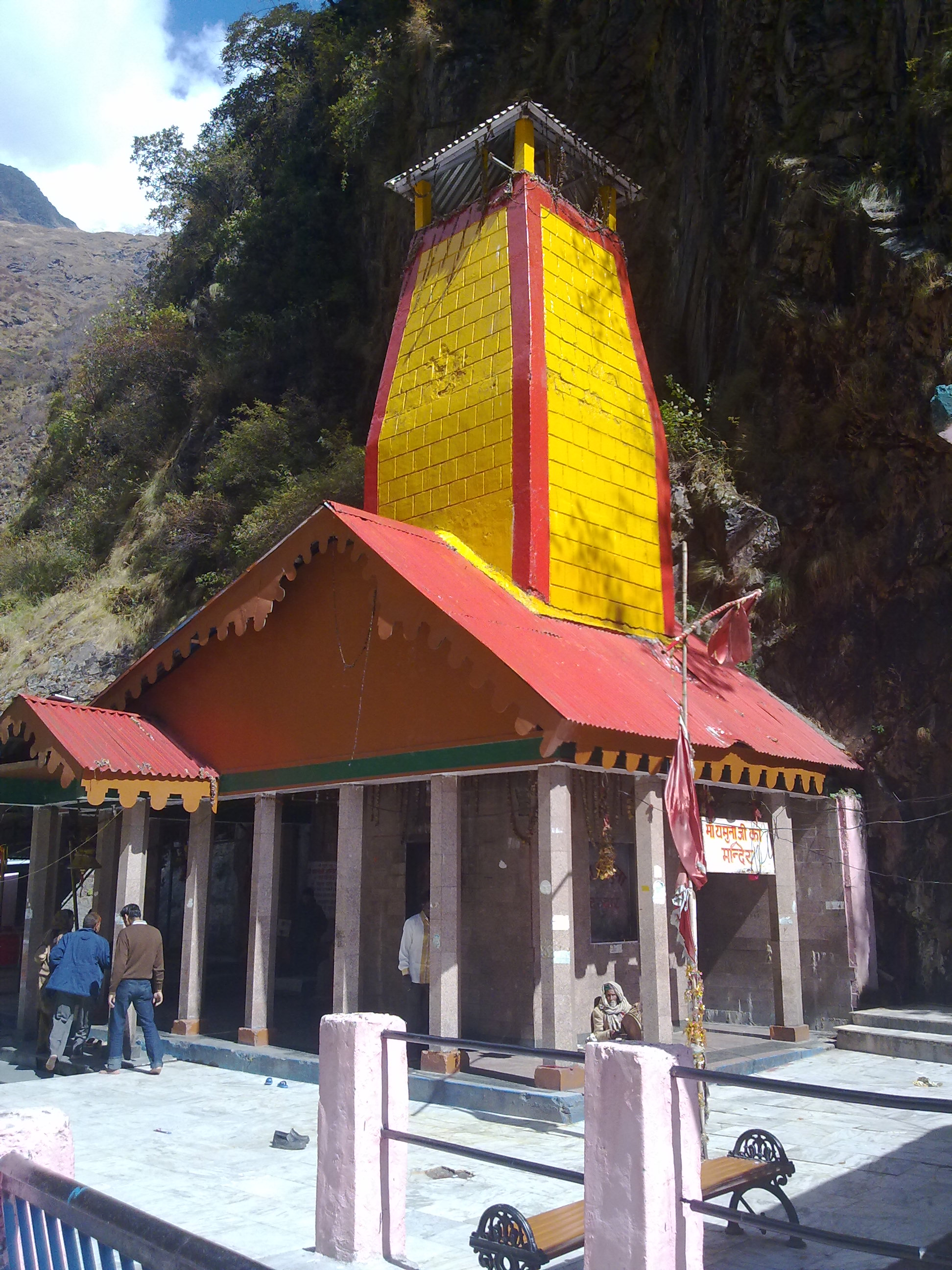 Yamunotri Temple